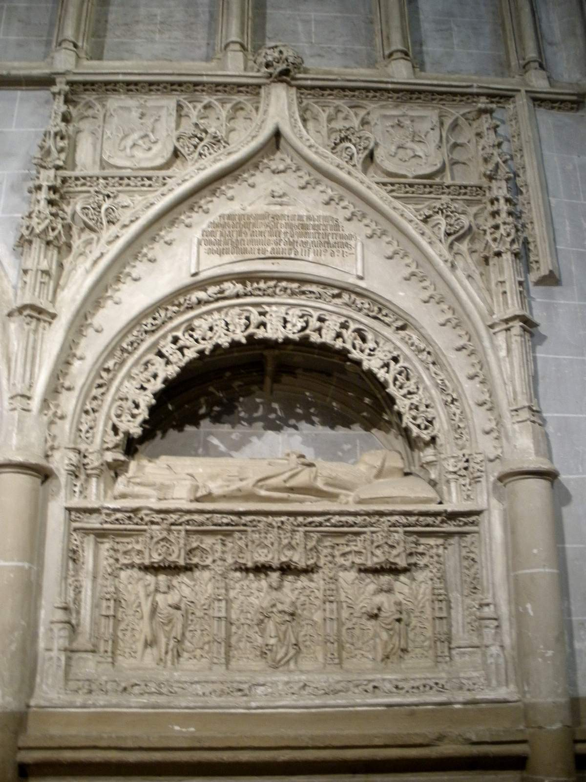 Trasaltar de la Catedral de Palencia. Sepulcro del Abad de Husillos, don Francisco Núñez. Obra de Alejo de Vahía. 1501